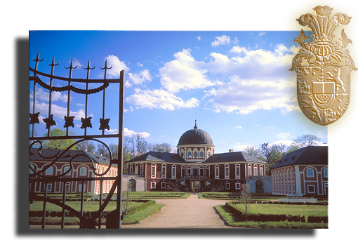 Zámek Veltrusy s čestným dvorem